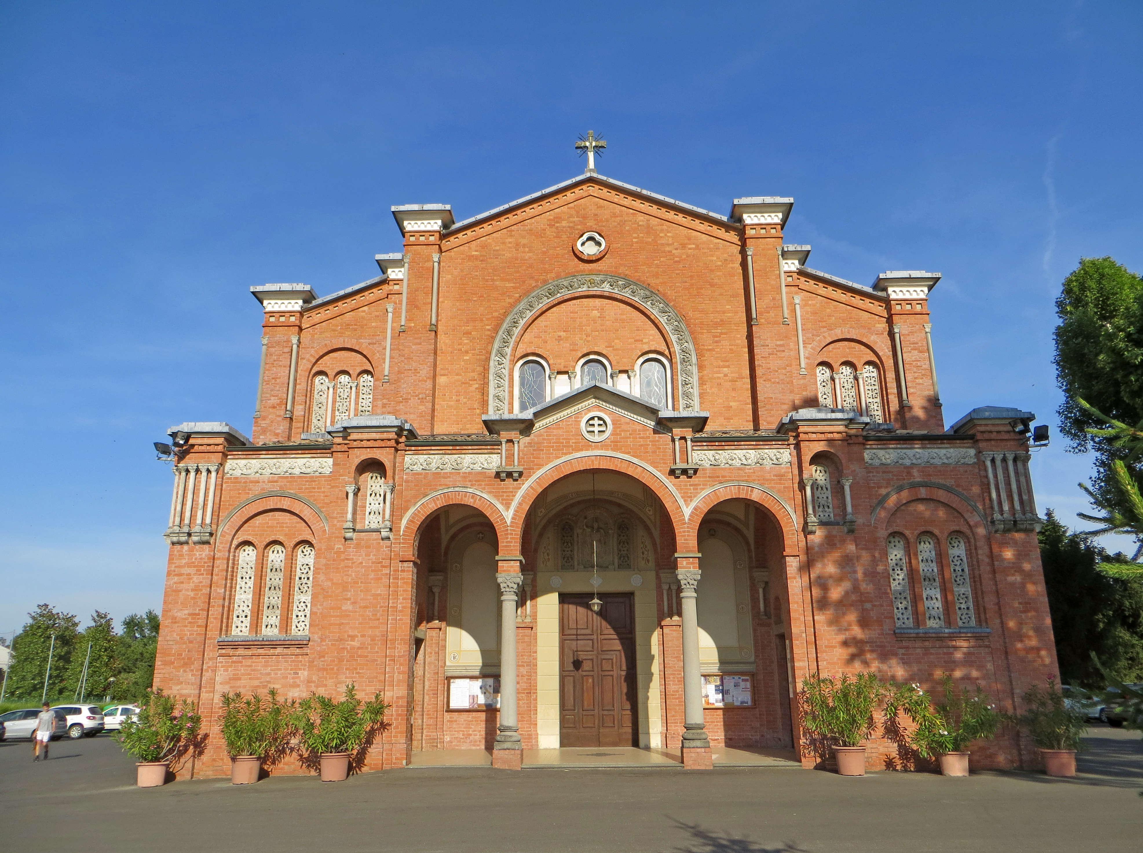 Chiesa di San Giovanni Battista (Basilicanova, Montechiarugolo) - facciata